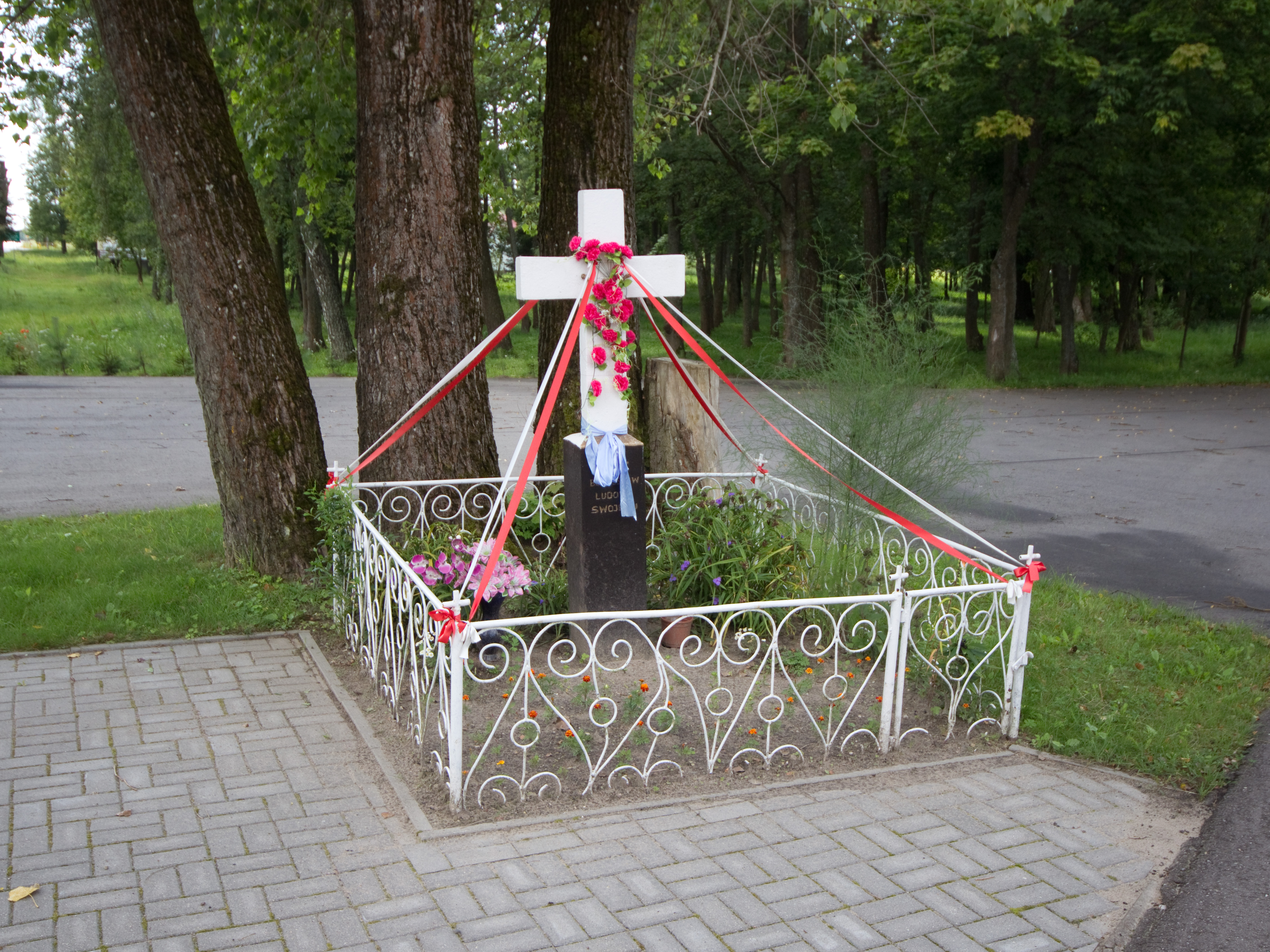 Kříž, Bezledy, Varmijsko-mazurské vojvodství